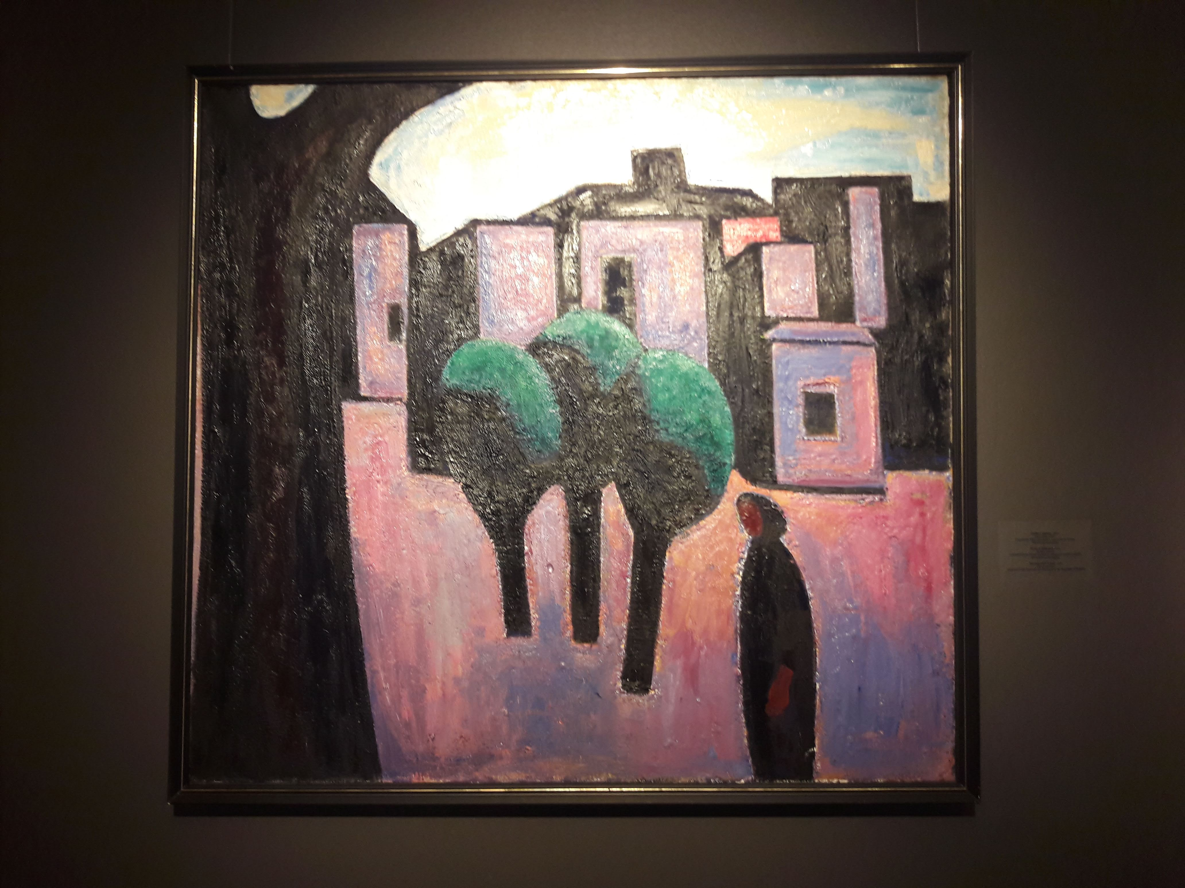 Відарыс самага знакамітага палатна. Зроблена ў жніўні 2018г. у Нац. мастацкім музэі Менска на персанальнай выставе мастака.